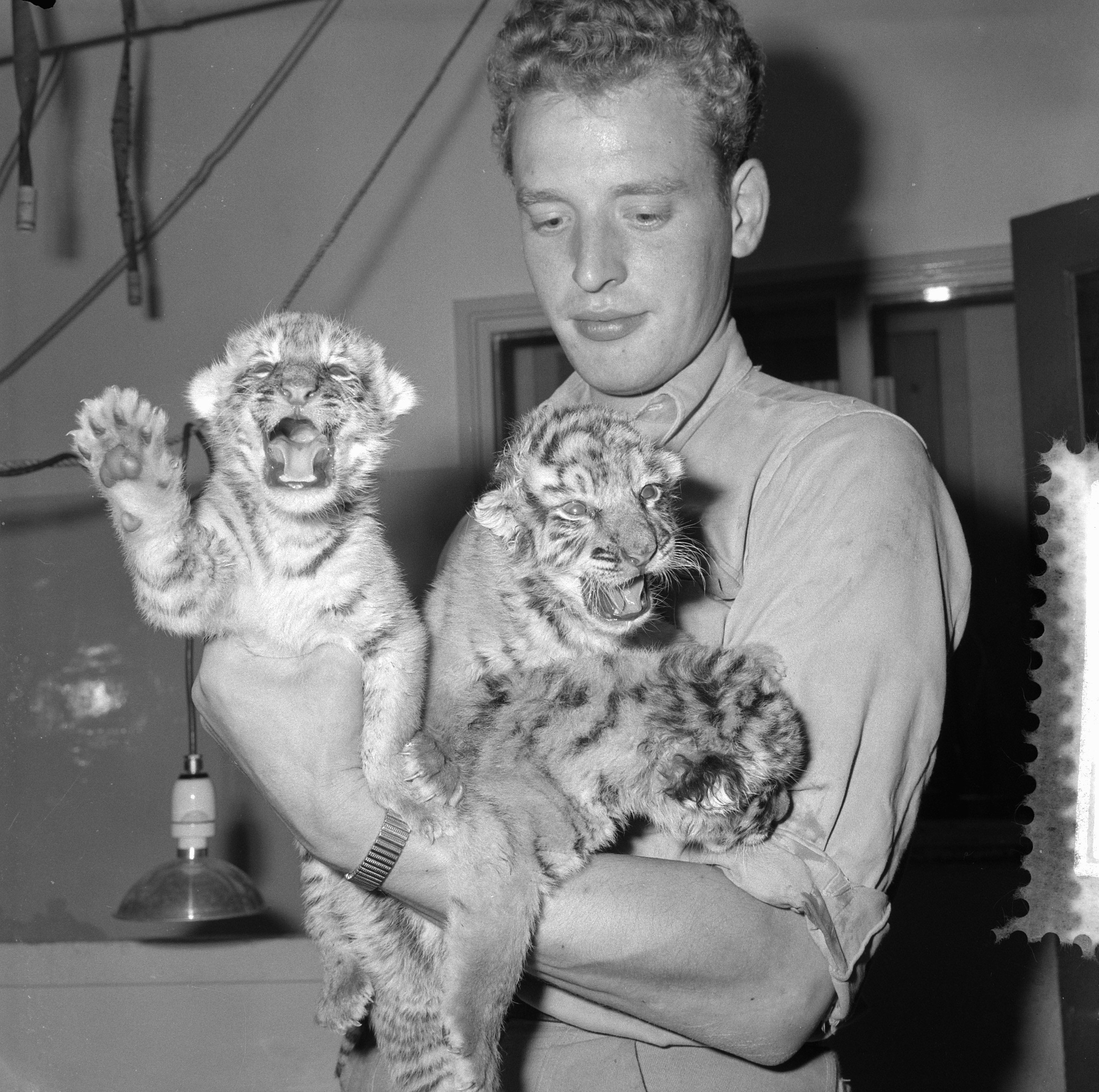 Collectie / Archief : Fotocollectie Anefo Reportage / Serie : [ onbekend ] Beschrijving : Jonge tijgers in Artis Datum : 17 augustus 1964 Trefwoorden : TIJGERS Instellingsnaam : Artis Fotograaf : Nijs, Jac. de / Anefo Auteursrechthebbende : Nationaal Archief Materiaalsoort : Negatief (zwart/wit) Nummer archiefinventaris : bekijk toegang 2.24.01.03 Bestanddeelnummer : 916-7779